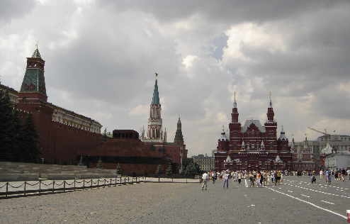 Place Rouge à Moscou